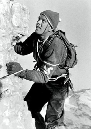 Lino Lacedelli climbing K2 in 1954